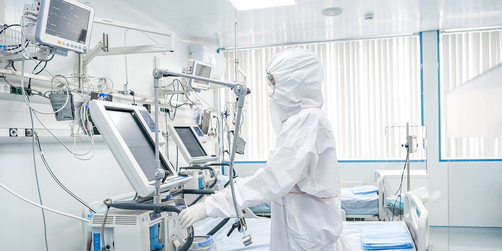 Сотрудник коронавирусного стационара при Сеченовском университете (Первый московский государственный медицинский университет имени И.М. Сеченова) рядом с мед. оборудованием